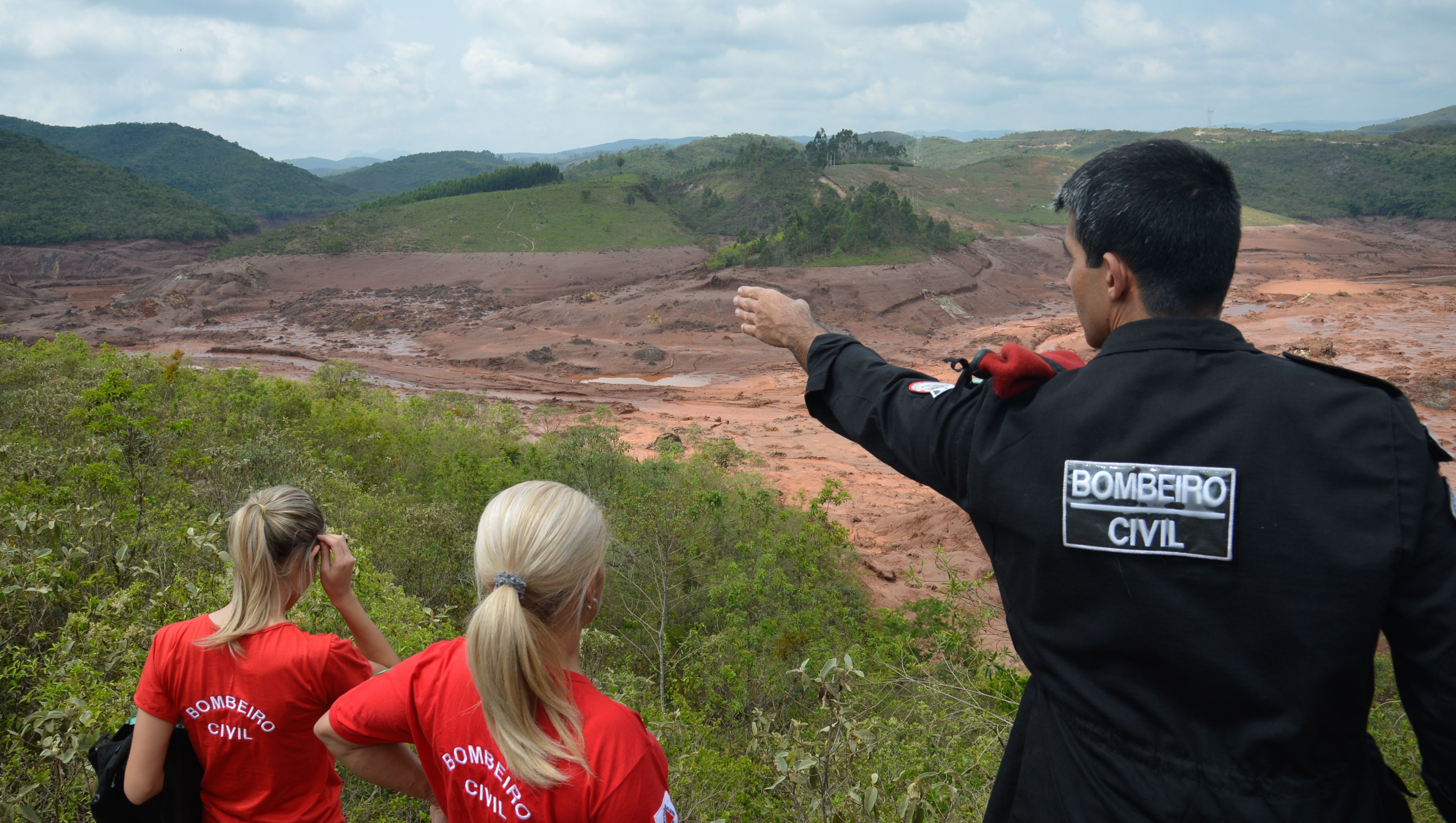 Mariana (MG) - Área afetada pelo rompimento de barragem no distrito de Bento Rodrigues, zona rural de Mariana, em Minas Gerais